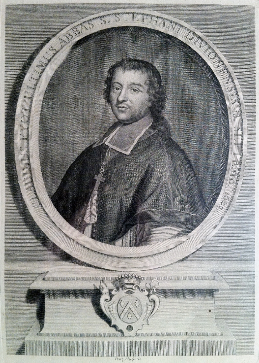 Portrait gravé de Claude Fyot de La Marche (1630-1721), comte de Bosjean, Aumonier du roi, Abbé de Saint-Étienne de Dijon